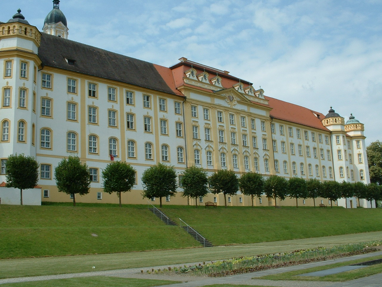 Ochsenhausen Abbey